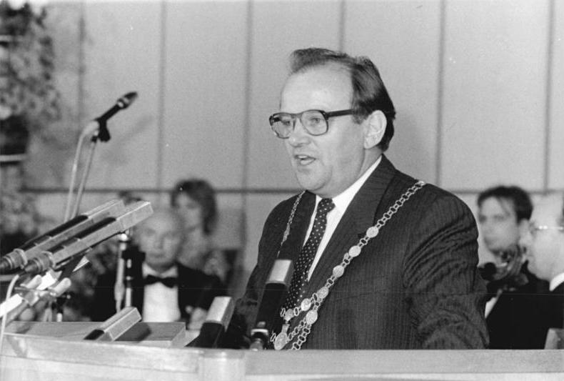 ADN-ZB Zimmermann 28.10.87 Berlin: Jubiläum. Stadtverordnete- Auf den Tag genau 750 Jahre nach der ersten urkundlichen Erwähnung Berlins trat die Stadtverordnetenversammlung zu einer festlichen Sitzung im Roten Rathaus der DDR-Hauptstadt zusammen. In der Festansprache zog der Oberbürgermeister Erhard Krack eine Bilanz der Entwicklung der Stadt.